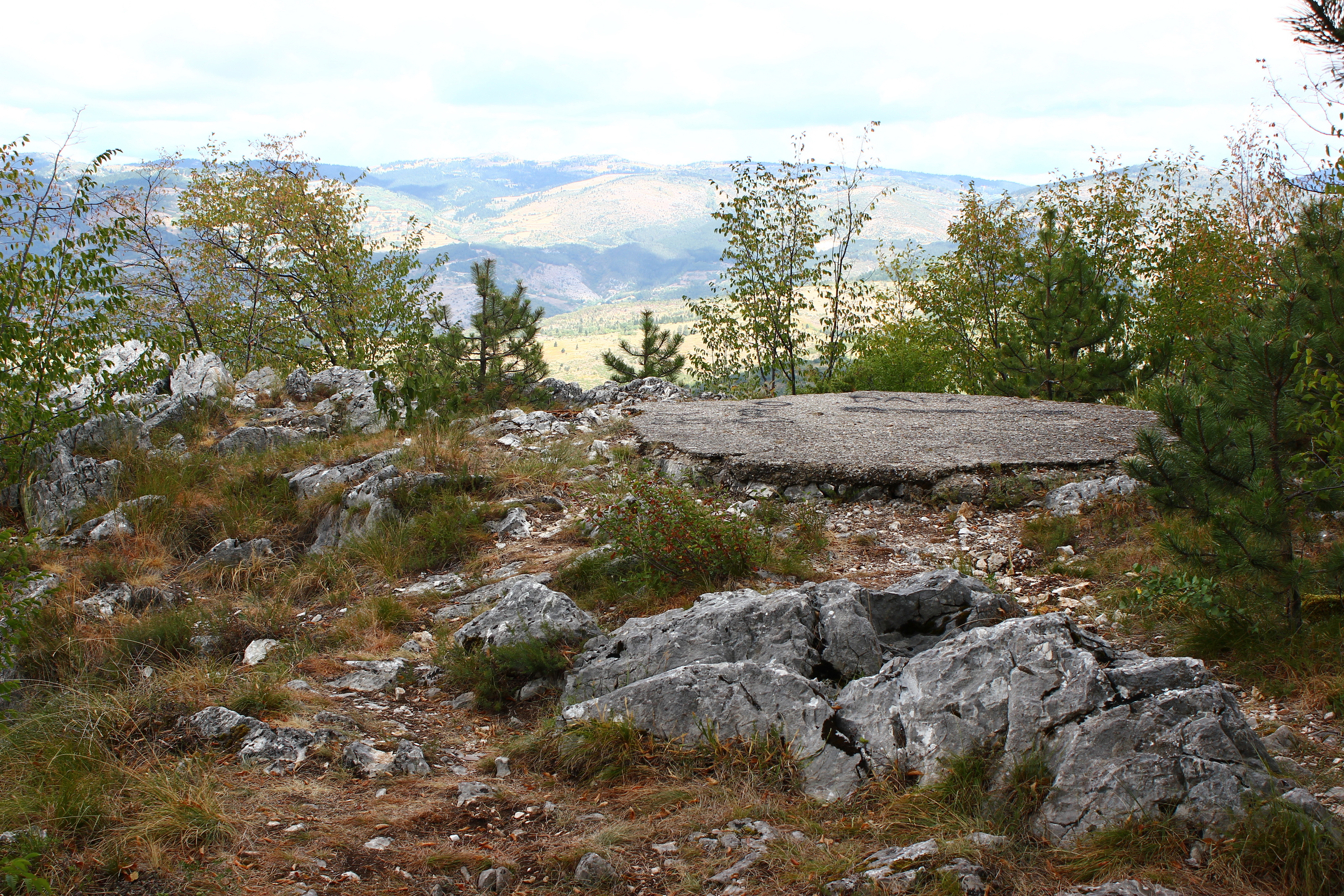 Artilleriestellung aus der Zeit der Belagerung von Sarajevo auf dem Trebević oberhalb der Stadt.